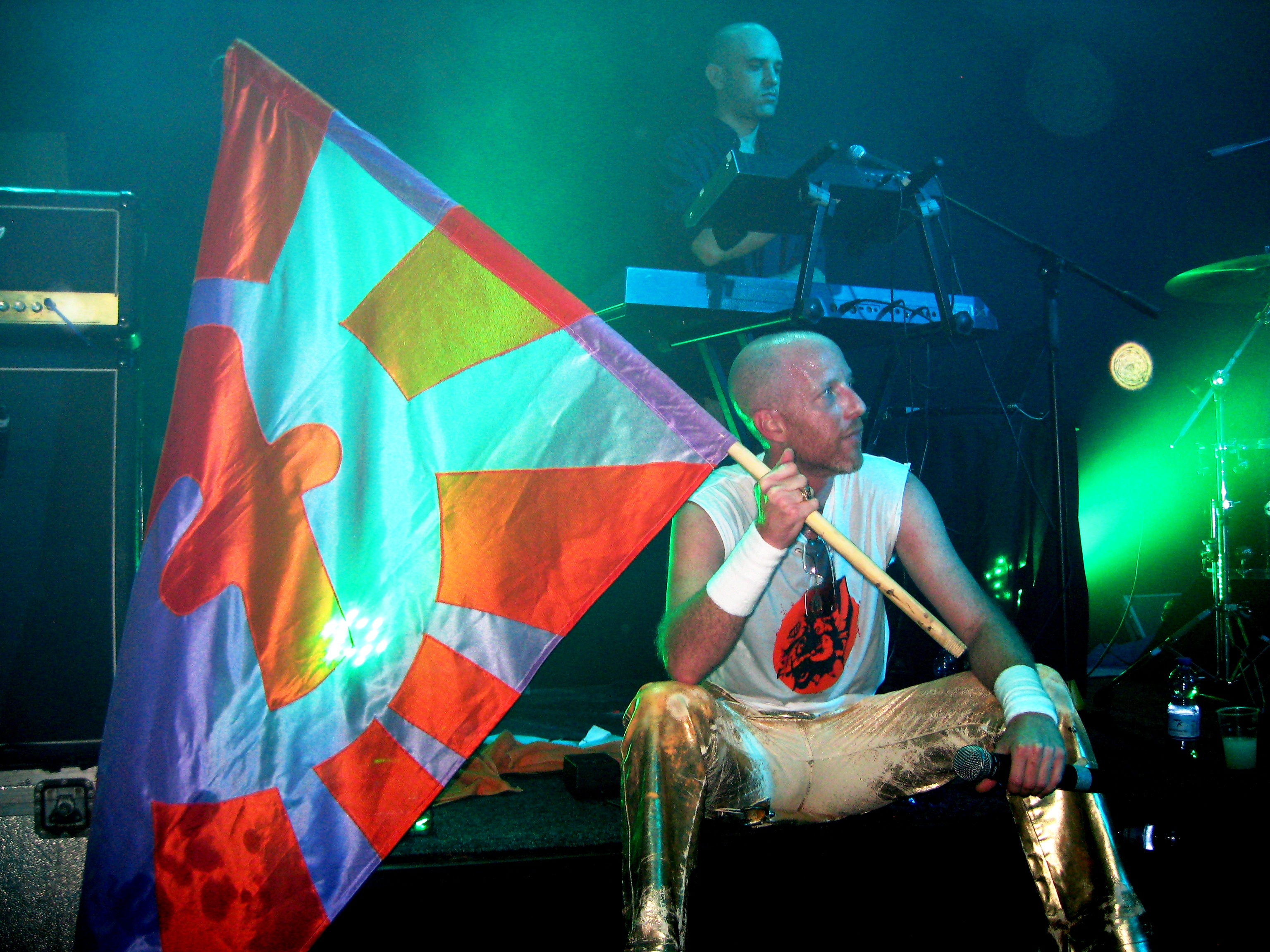 עמיר ירוחם במהלך הופעה של שב"ק ס' במועדון הבארוק בבאר-שבע